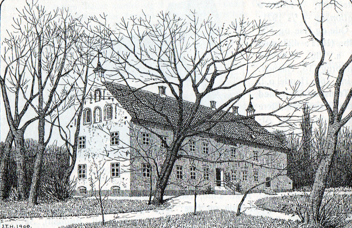 Stårup Hovedgård eller Stårupgård er en hovedgård i Højslev Sogn, i det tidligere Fjends Herred, Viborg Amt, nu Skive Kommune, Region Midtjylland.